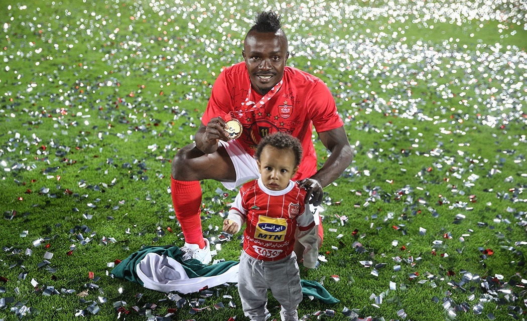 گادوین منشا در جشن قهرمانی پرسپولیس در لیگ برتر فوتبال ایران